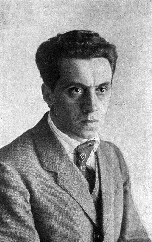 Portreto de Ernst Toller